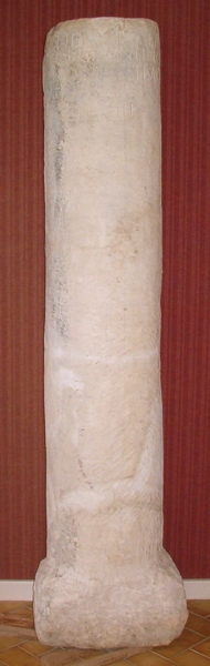 Borne milliaire exposée au musée de Soulosse-sous-Saint-Élophe (Vosges). Cette borne a été trouvée à proximité de cette localité. Elle correspond à l'inscription CIL XVII2, 535 Cf. R. Billoret, « Découverte de deux bornes milliaires à Soulosse (Vosges) », dans RAE, XX, 1969, p. 219-233. Gerold Walser, Corpus inscriptionum latinarum, XVII-2, 1986, inscr. 535 p. 207. (© Francis MONTIGNON) GFDL